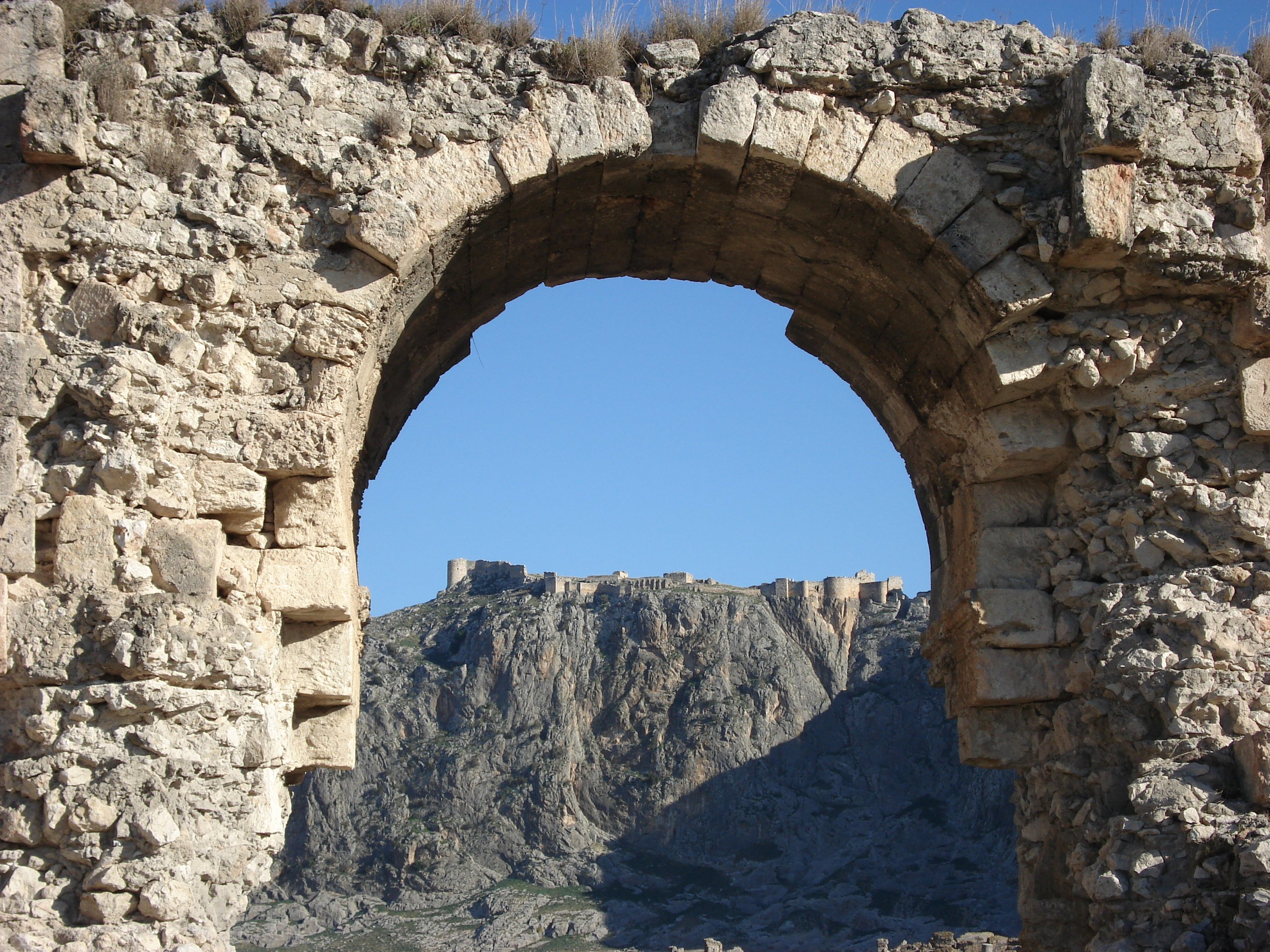 Anavarza Kalesi, Kozan.